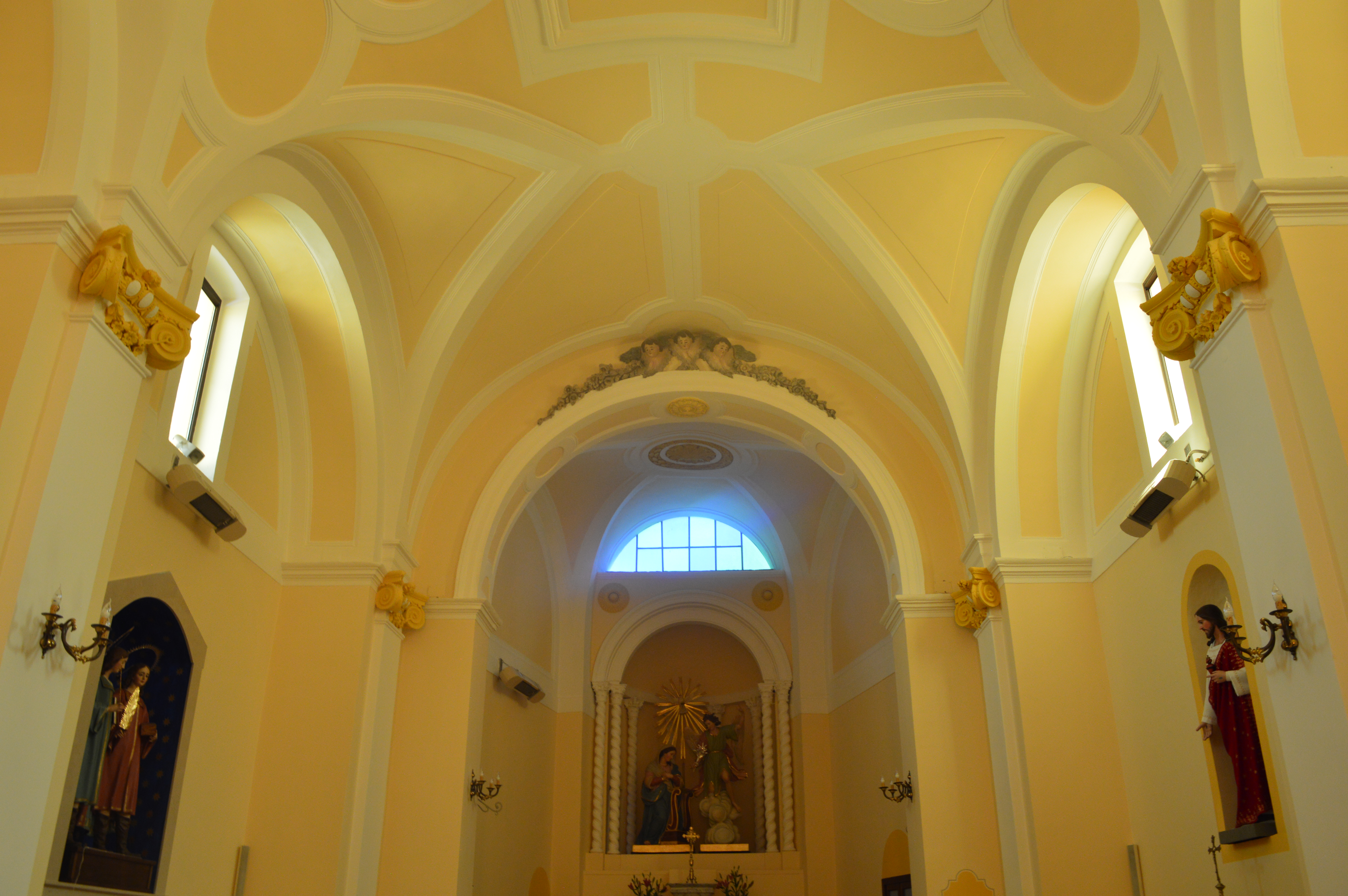 Interno della Chiesa dell'Annunziata, si possono ammirare le decorazioni della volta.